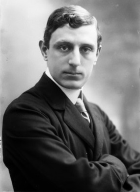 Giovanni Poggi